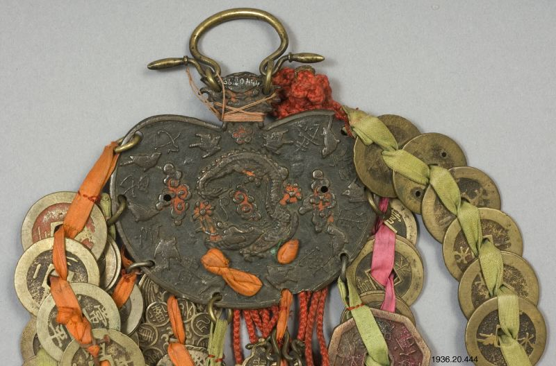 1936.20.0444 Amulett bestående av en bladformig platta av brons med en mängd figurer i relief, bl.a. 5 läderlappar och 2 stående människofigurer, omgivande ett runt stiliserat shou-tecken. Från plattan hänga ned olikfärgade sidenband påträdda mynt och amultter. /generalkatalog China Smutsigt, metallen är oxiderad. /EM070809.